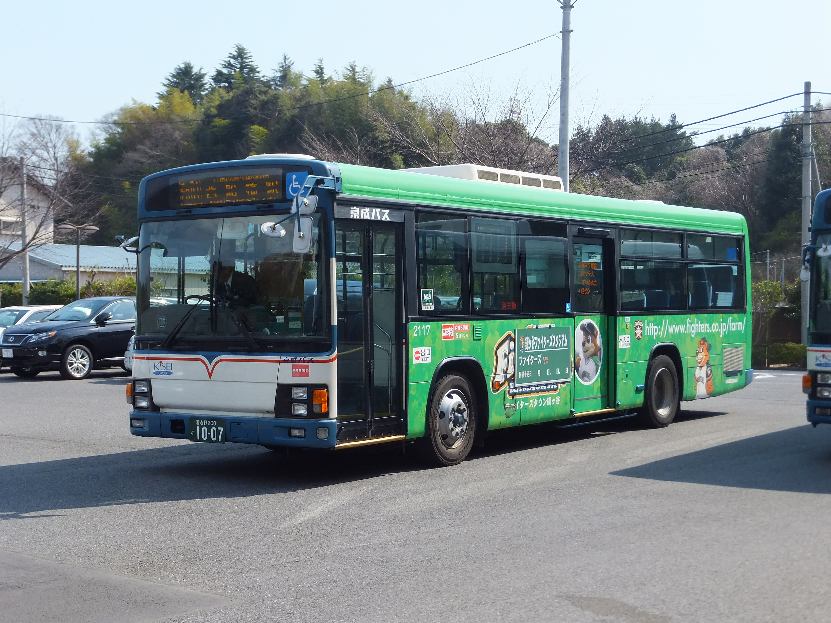 京成バス、北海道日本ハムファイターズラッピング仕様。ファイターズの選手たちによる車内アナウンスが放送されている。鎌ヶ谷ファイターズスタジアム入口にて。